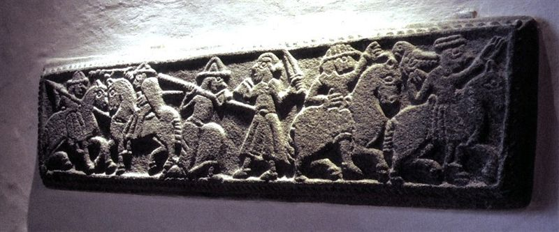 Bislev Kirke, Aalborg Kommune, Romansk gravsten på skibets vestvæg